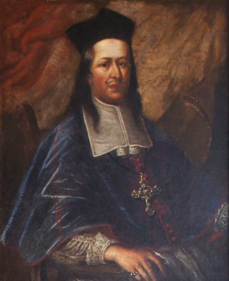 Porträtgemälde von Albrecht Sigismund von Bayern, Fürstbischof von Freising, im Fürstengang zwischen Fürstbischöflicher Residenz und Freisinger Dom.